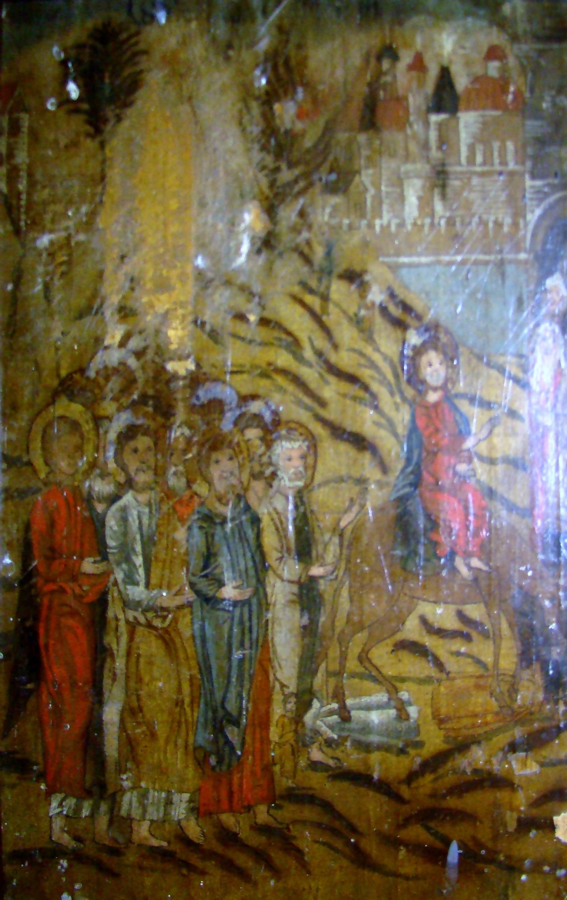 Biserica de lemn din Stolna, județul Cluj